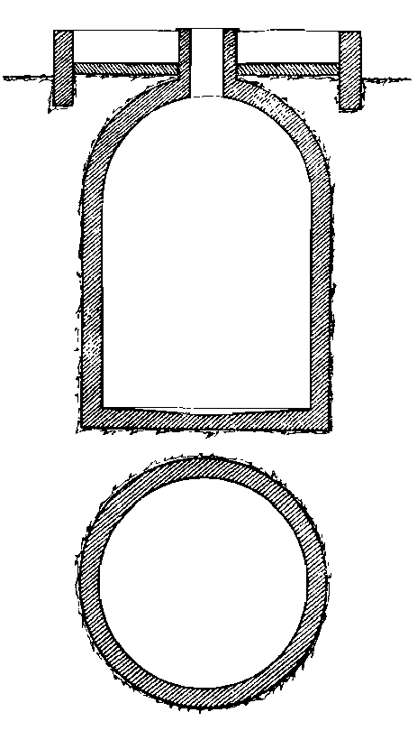 Cisterne